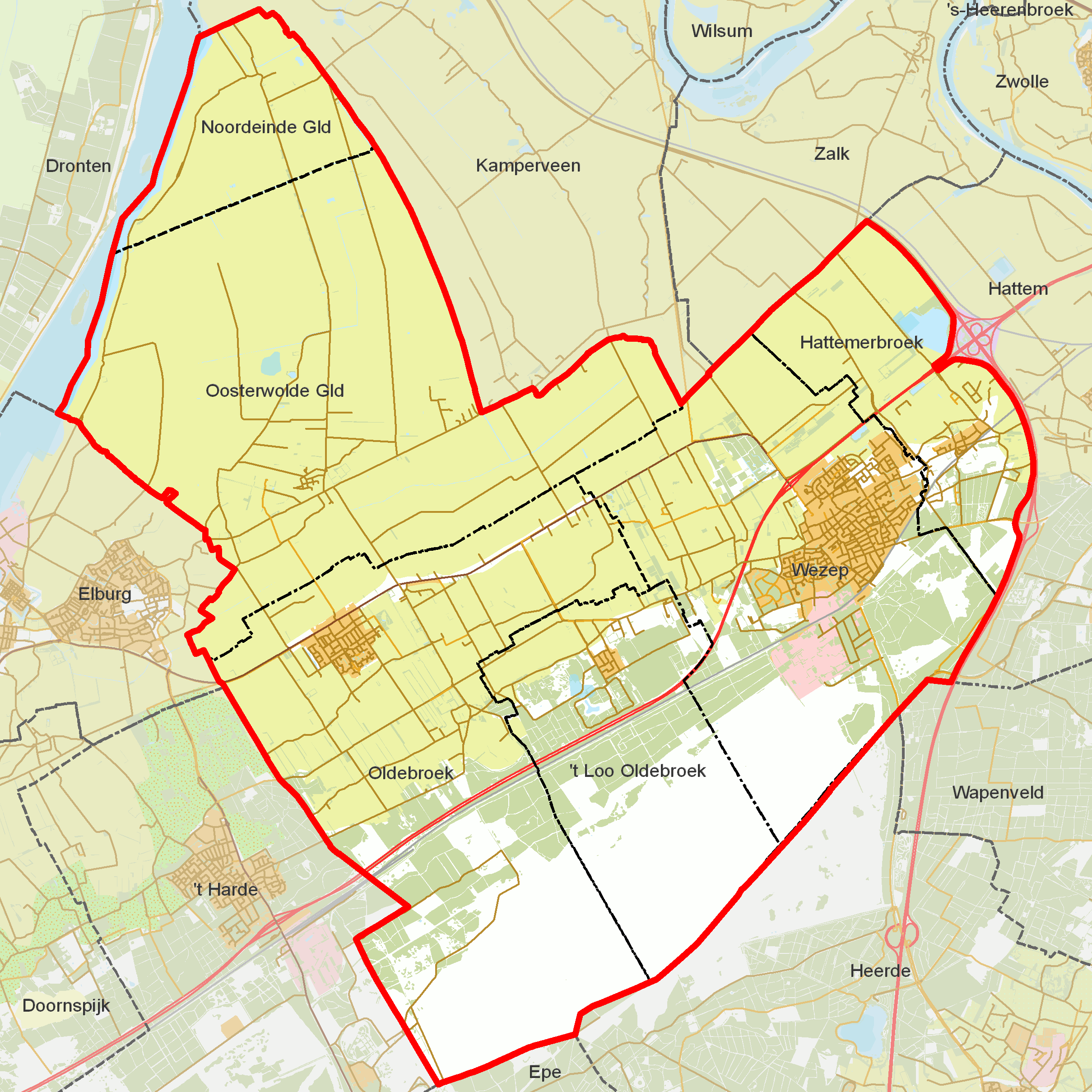 BAG woonplaatsen - Gemeente Oldebroek.png